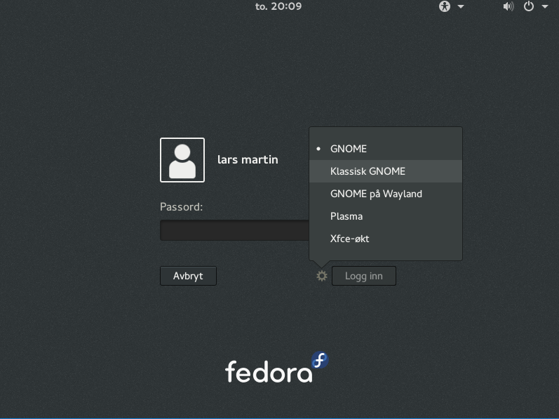 Viser innloggings bilde i fedora